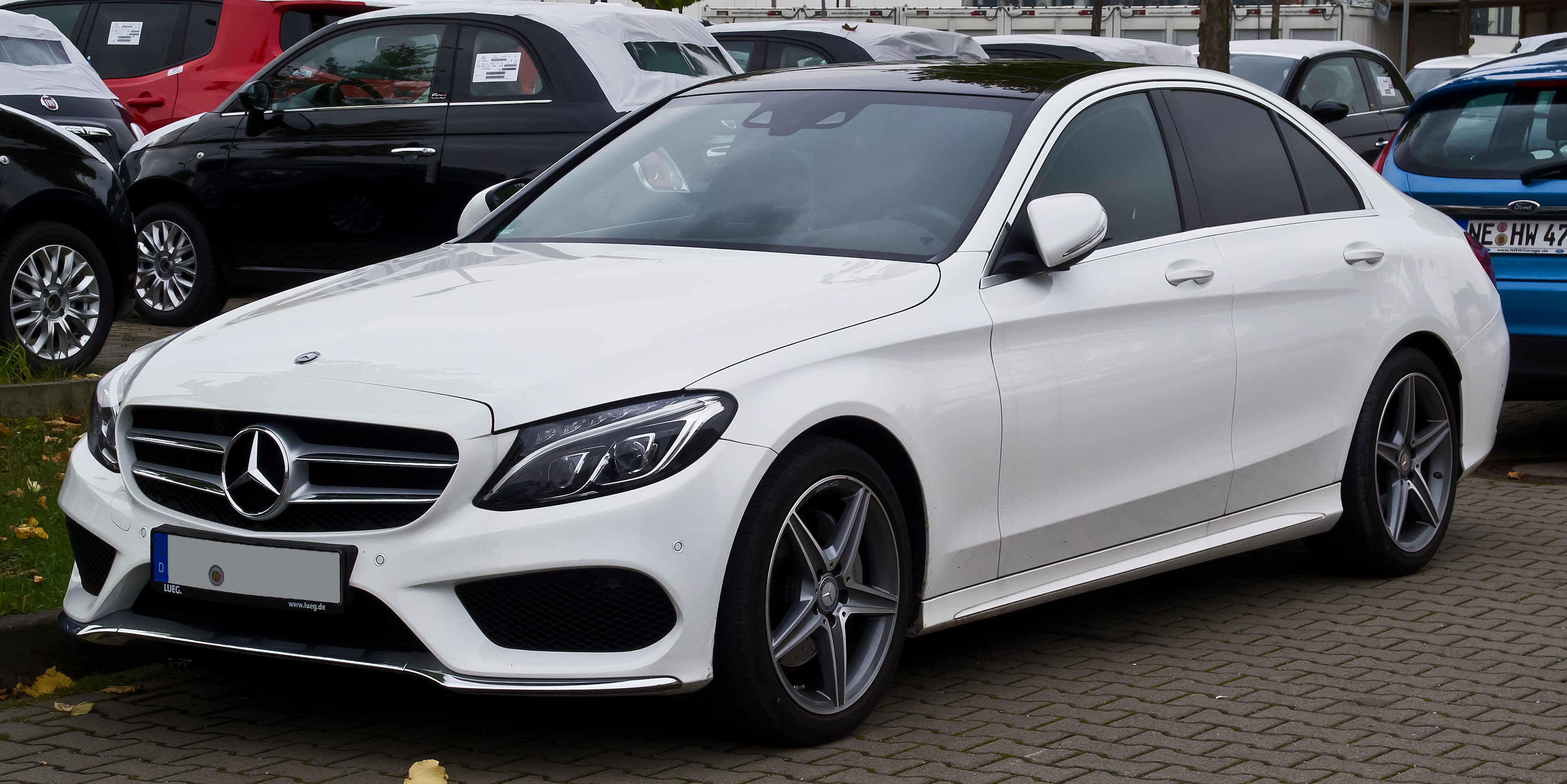 Mercedes-Benz C 220 BlueTEC AMG Line (W 205)